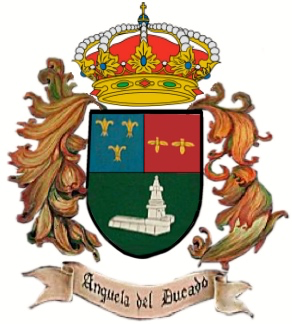 Anquela del Ducado - Escudo del municipio